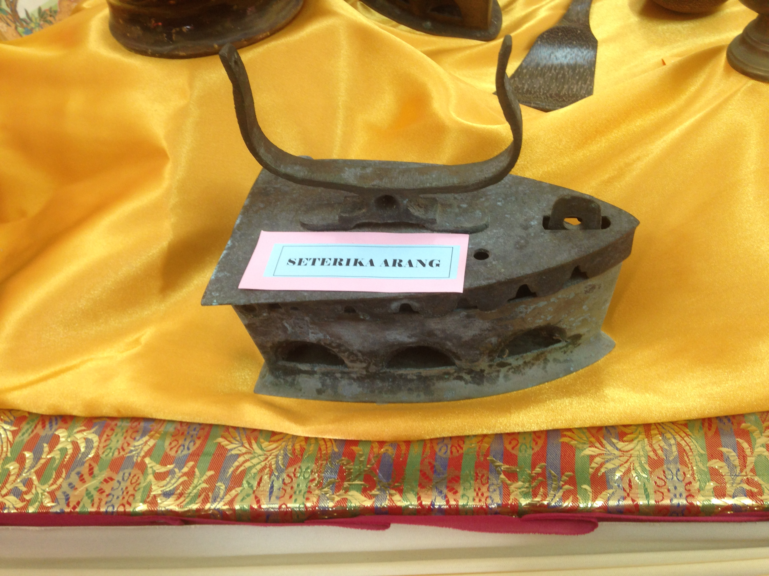 SETERIKA ARANG